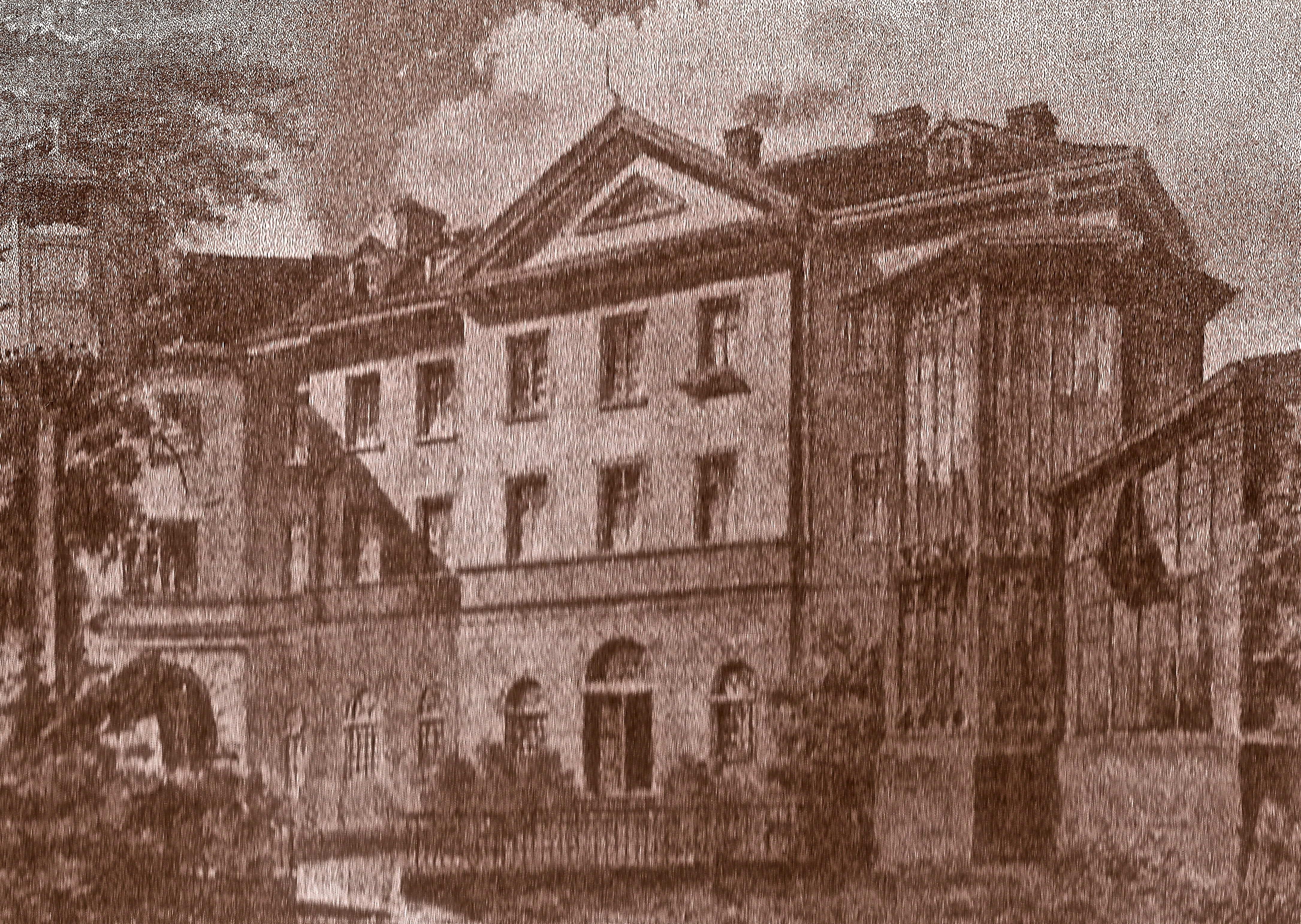 Palais Conradi Stuttgart um 1850, Gartenseite mit Gewächshäusern und Taubenhaus